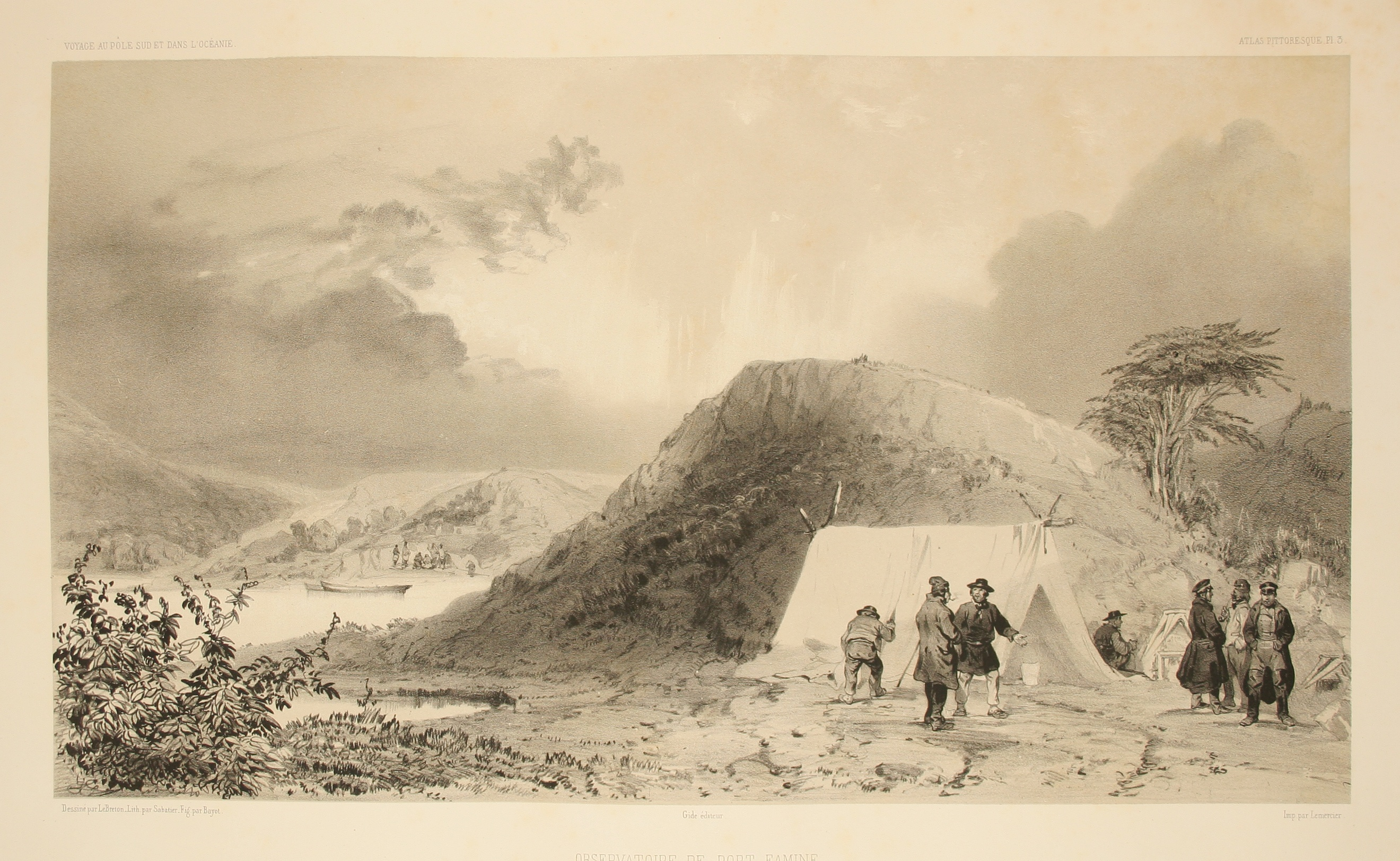 Atlas pittoresque, planche 03 - « Observatoire de Port Famine » ; Port Famine ou Puerto Hambre se situe au sud de Punta Arenas sur les rives du détroit de Magellan au Chili.